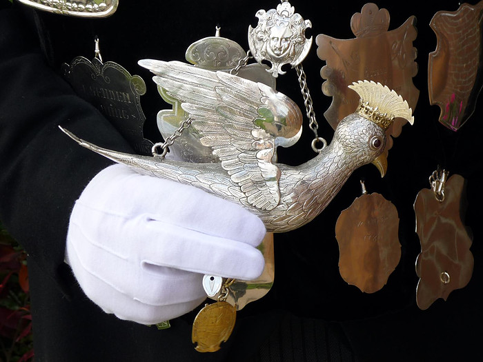 De zilveren koningsvogel uit 1628/29 van schutterij St. Sebastianus in Mheer (L.). De poten en het kroontje van de vogel zijn verguld. Aan de onderkant hangt een schildje met het familiewapen Van Imstenraedt.